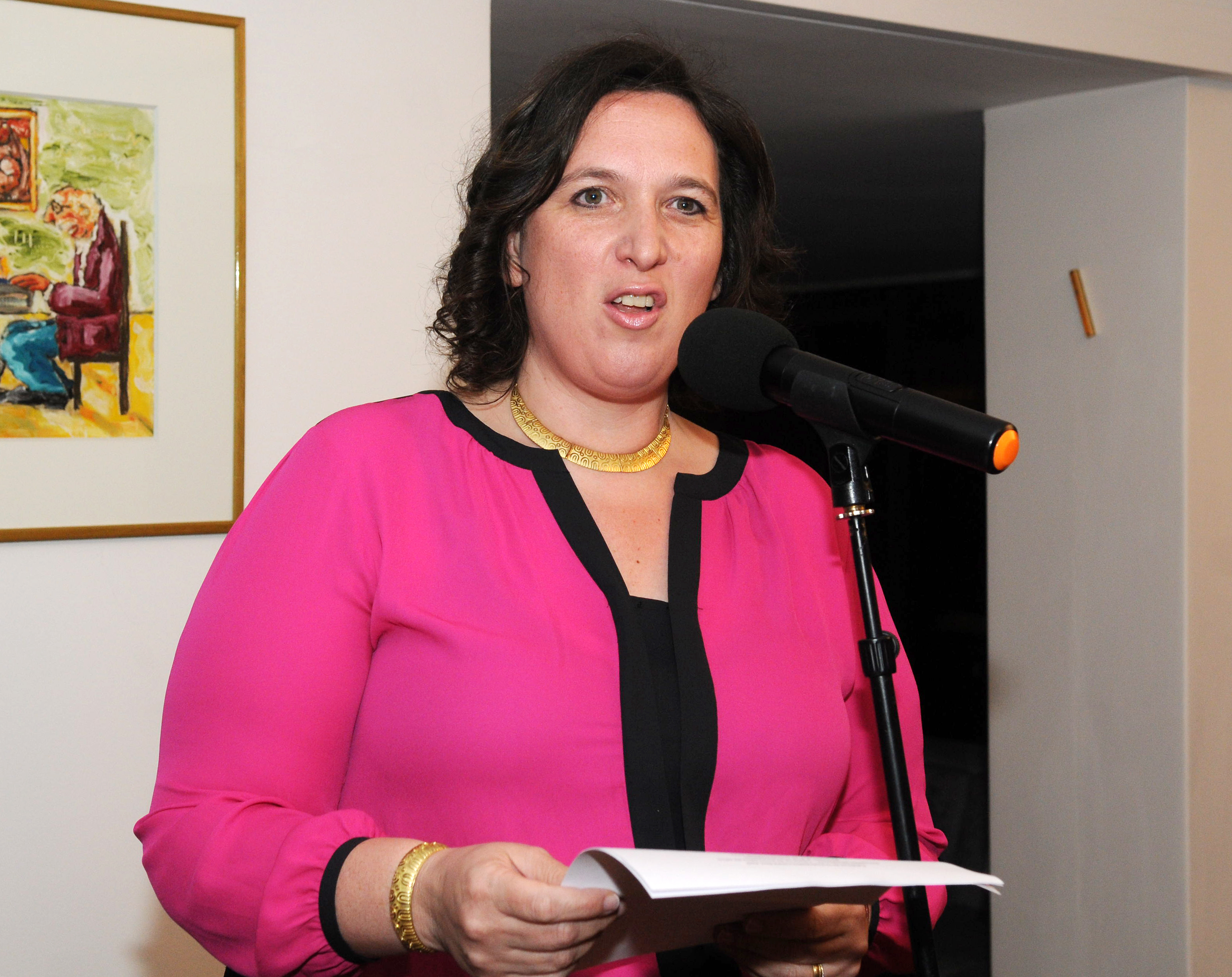 Nina Ben Ami - Embajadora de Israel en Uruguay